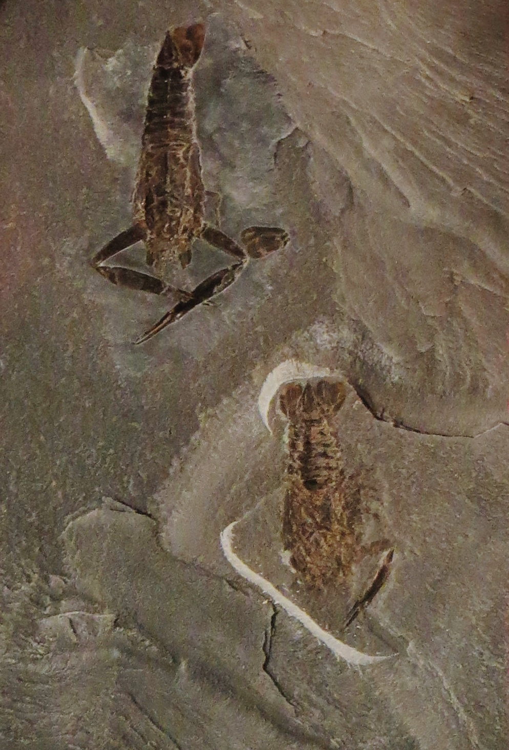 Fossil - Took the picture at Palazzo Dugnani, Milano